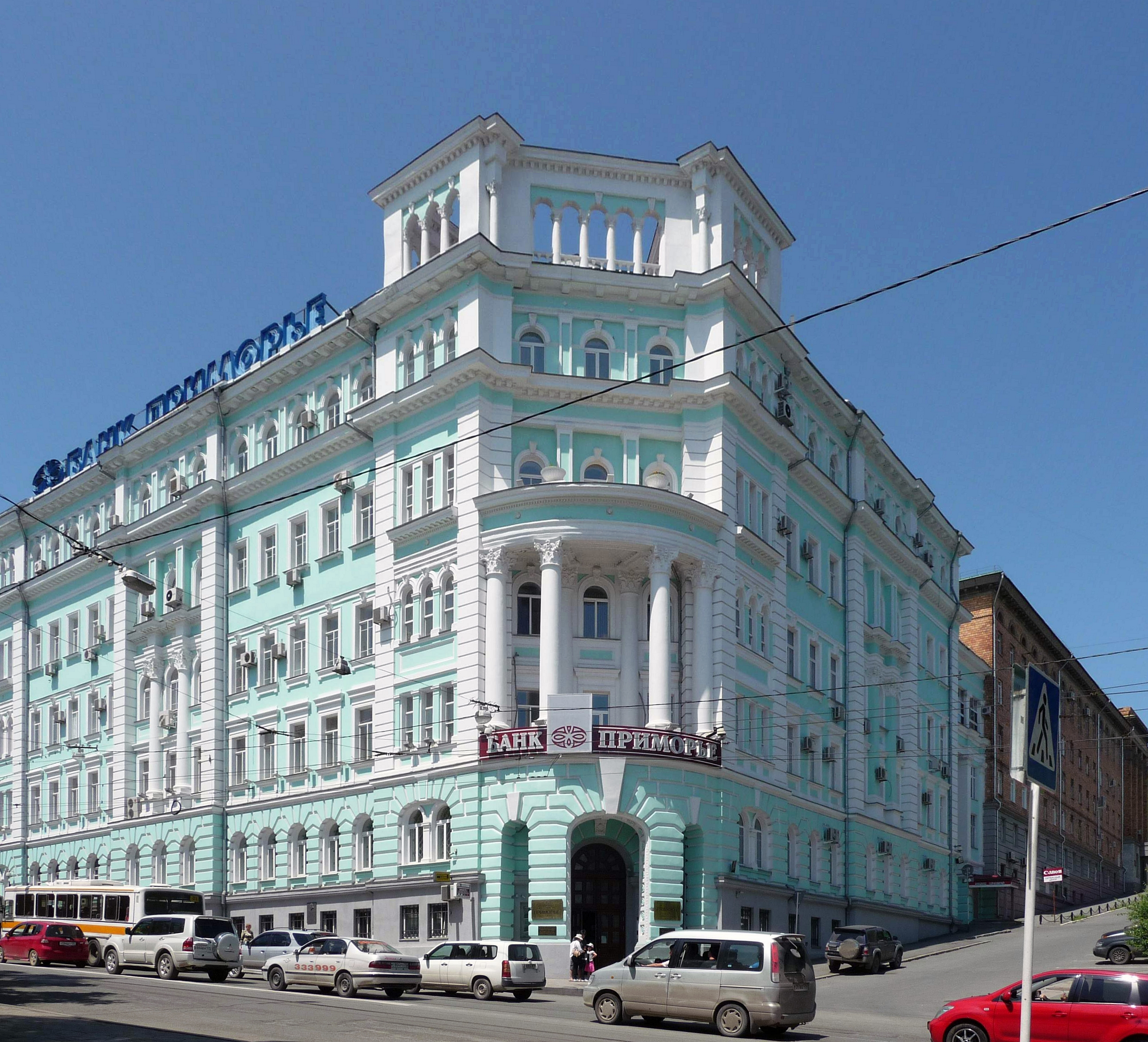 Владивосток, Светланская, 47, банк «Приморье» (бывшее здание Штаба Сибирской флотилии и Крайкома КПСС/ВЛКСМ), 2009-07-26